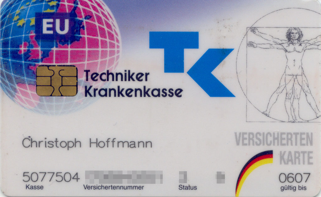 Europäische Krankenversicherungskarte (Deutschland), Vorderseite